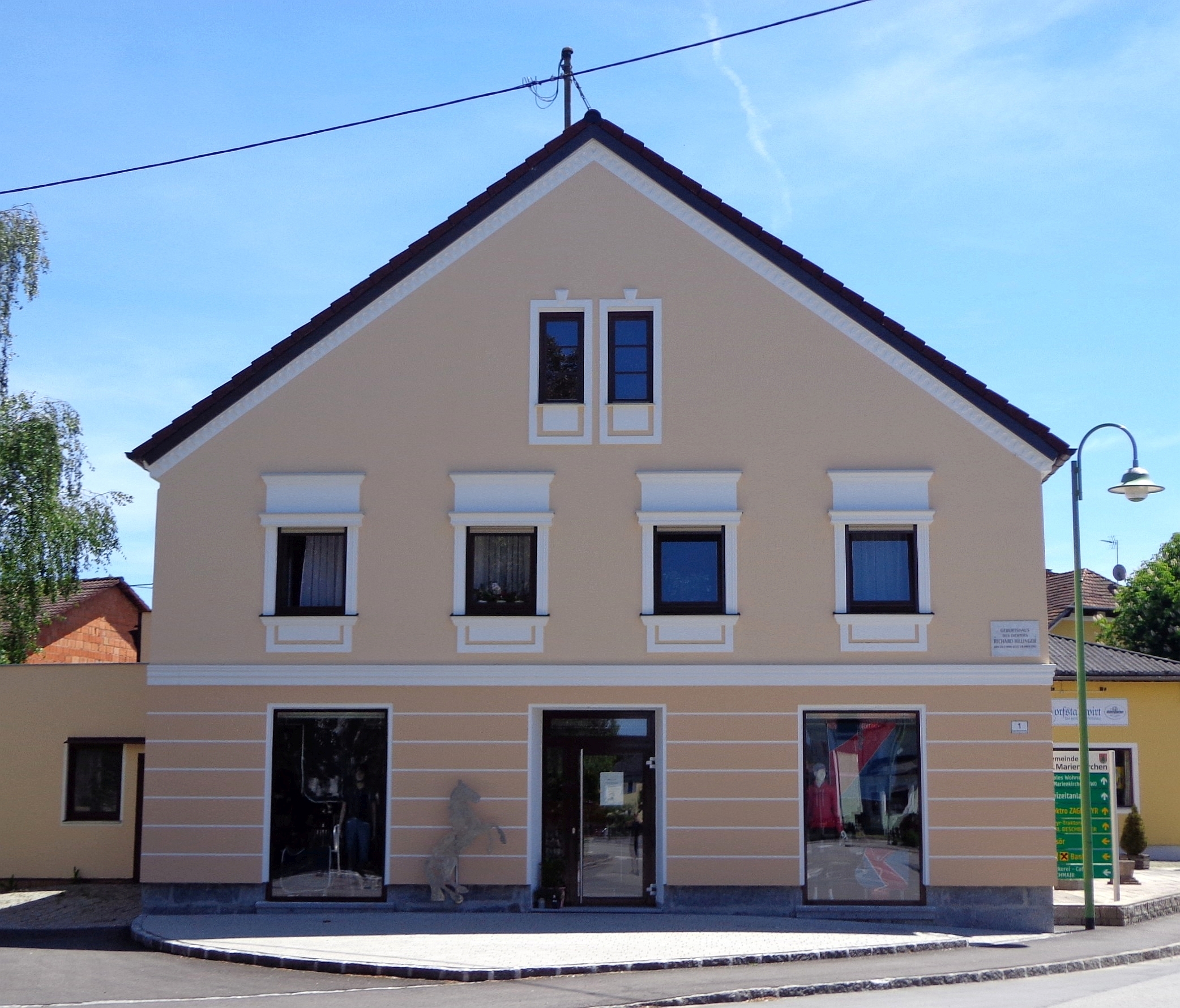 Geburtshaus Richard Billingers, Sankt Marienkirchen bei Schärding (Eggerdinger Straße 1)